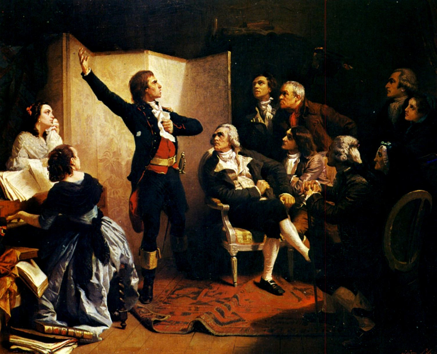 Rouget de Lisle chantant la Marseillaisetitle QS:P1476,fr:"Rouget de Lisle chantant la Marseillaise" label QS:Lfr,"Rouget de Lisle chantant la Marseillaise"